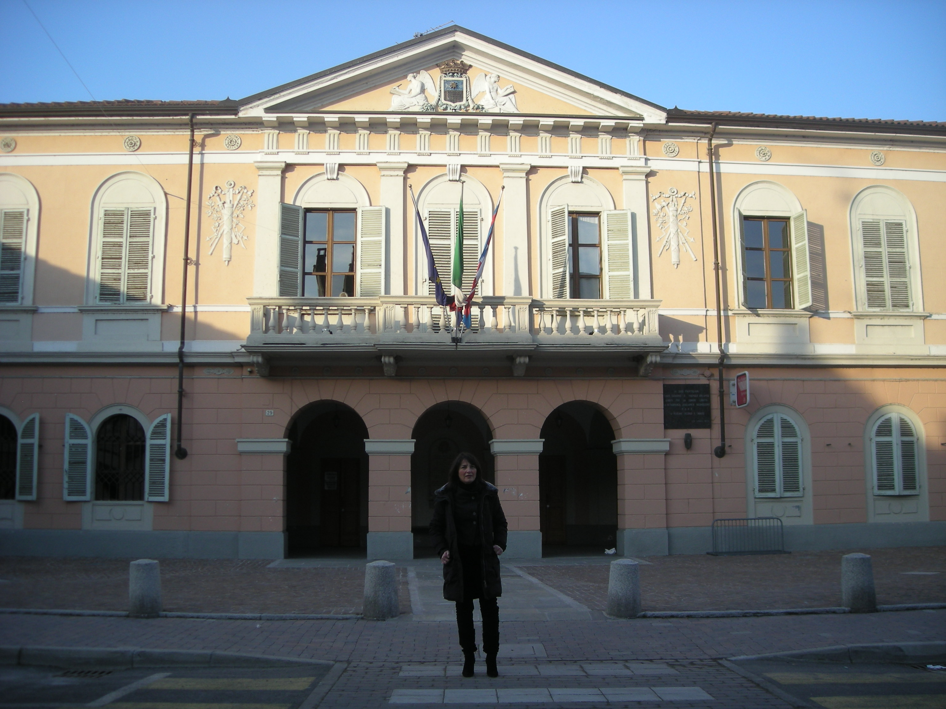 banca,Municipio Asigliano Vercellese